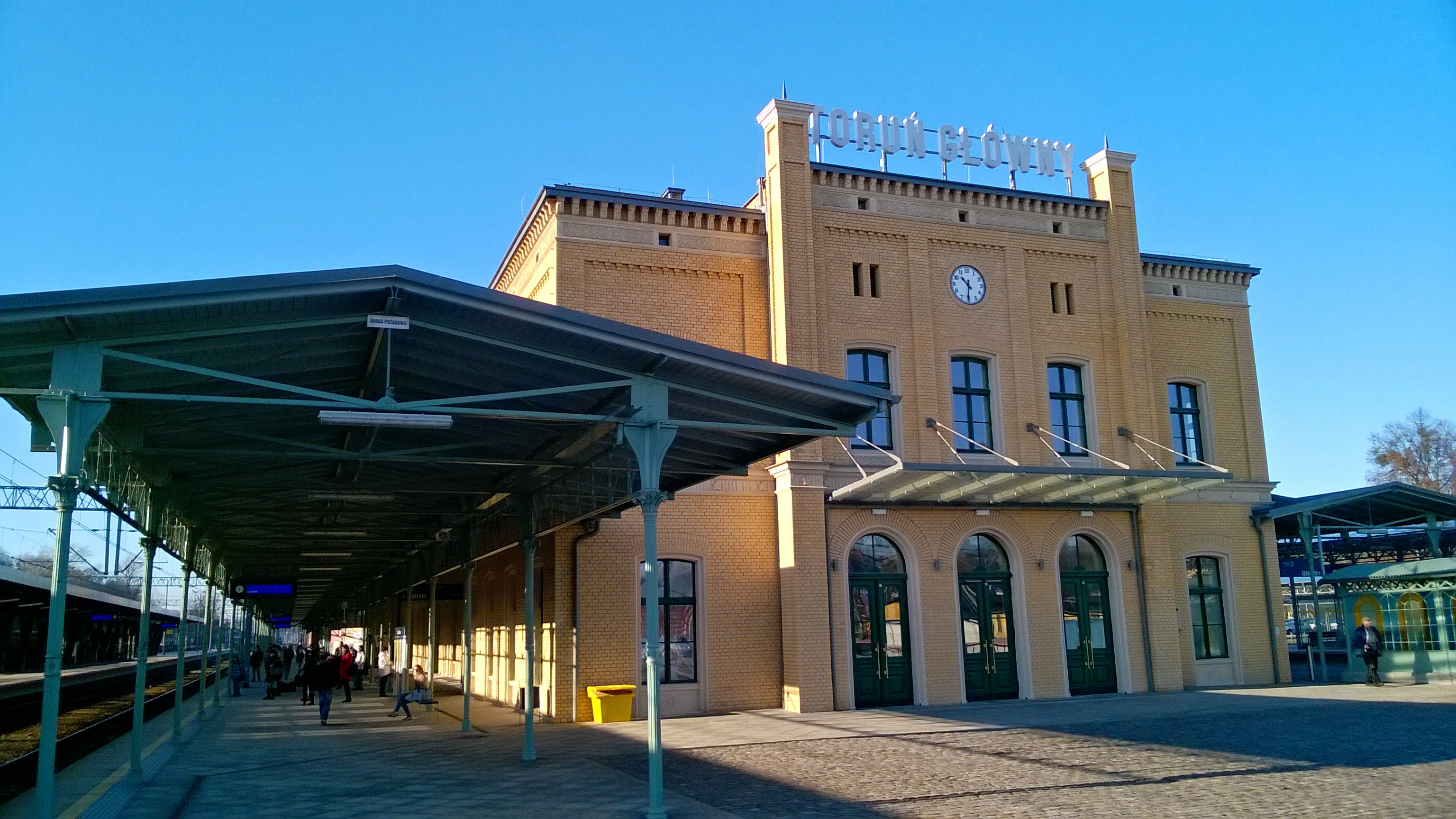 Toruń Główny 2016